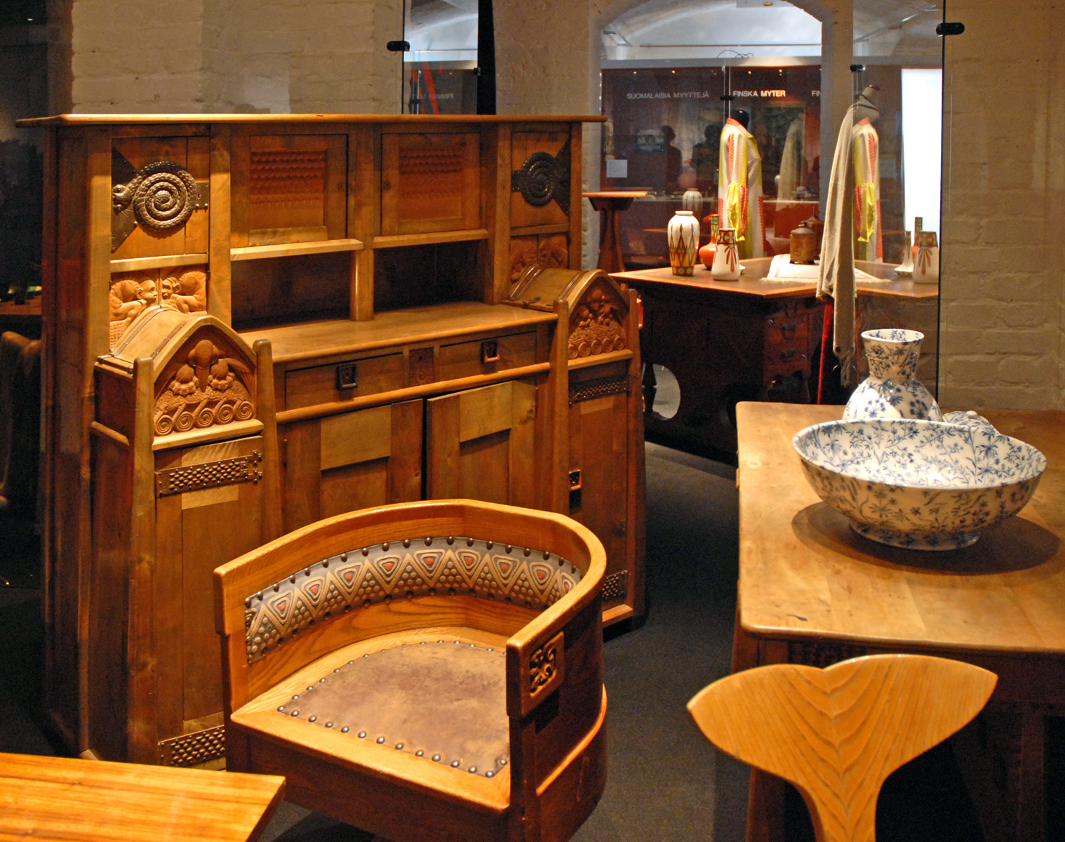 Meubles et objets du début du 20è siècle (chaise 1903, table 1905, céramiques Arabia, 1910, ..) A gauche, buffet ou placard de Valter Jung, (cupboard), 1903, Galerie historique du Musée du design (designmmuseo) L'exposition s'interroge sur les spécificités du design finlandais dans un marché mondialisé.Existe-t-il véritablement un style finlandais, inspiré par l'environnement, le bois, l'harmonie avec la nature ?